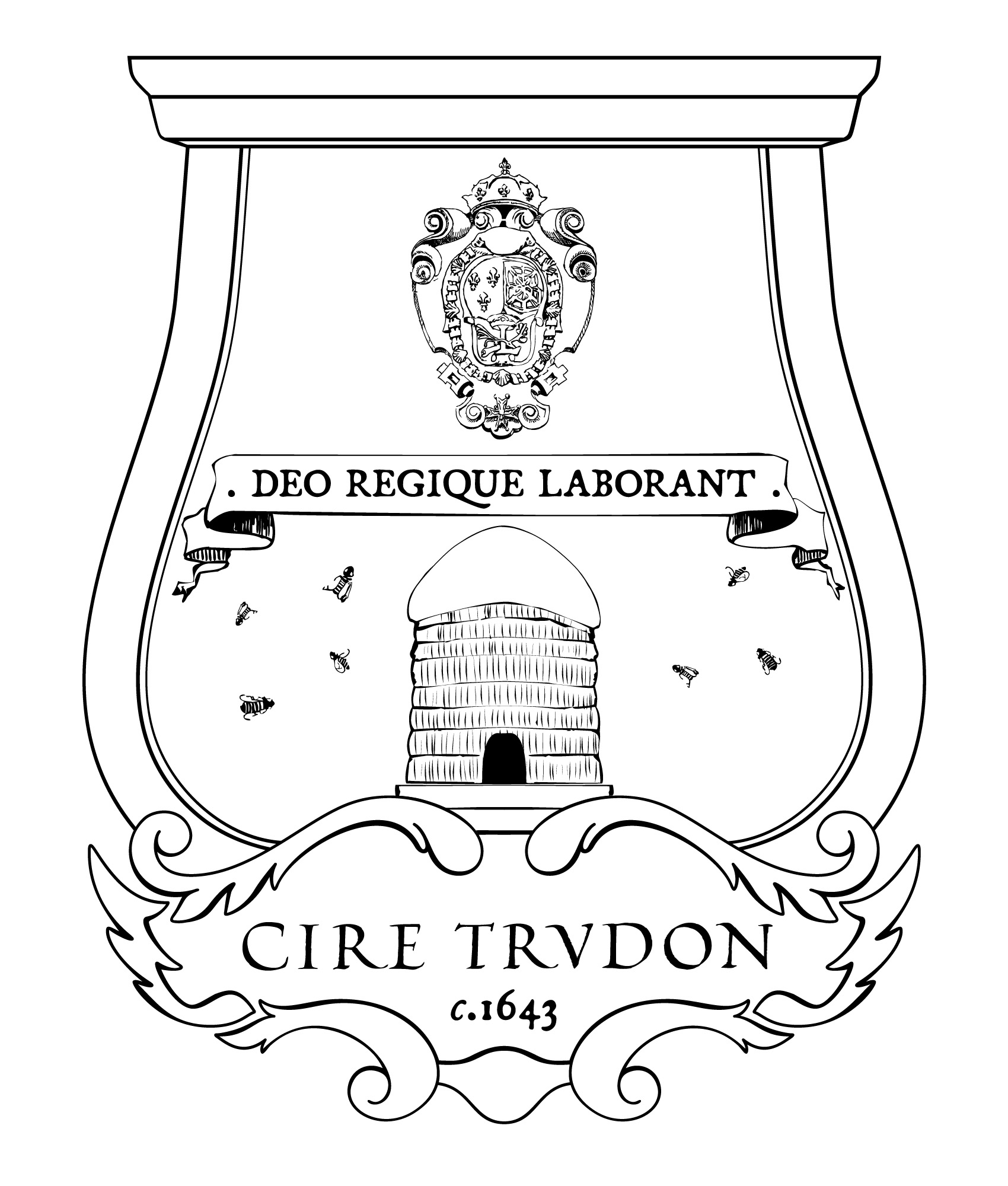 Le blason est inspiré d'un bas-relief se trouvant sur le site de l'ancienne Manufacture Royale de Cire, autrefois propriété de la famille Trudon, à Antony, près de Paris et aujourd'hui propriété de l'Eglise. Les lieux accueillent aujourd'hui la congrégation des soeurs de Saint Joseph de Cluny.